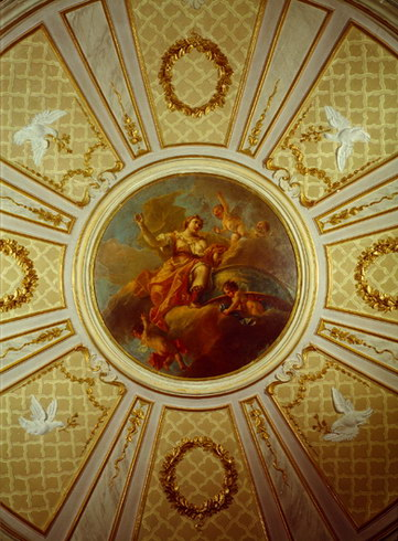 КИТАЙСКИЙ ДВОРЕЦ. КАМЕРЮНГФЕРСКАЯ. ПЛАФОН